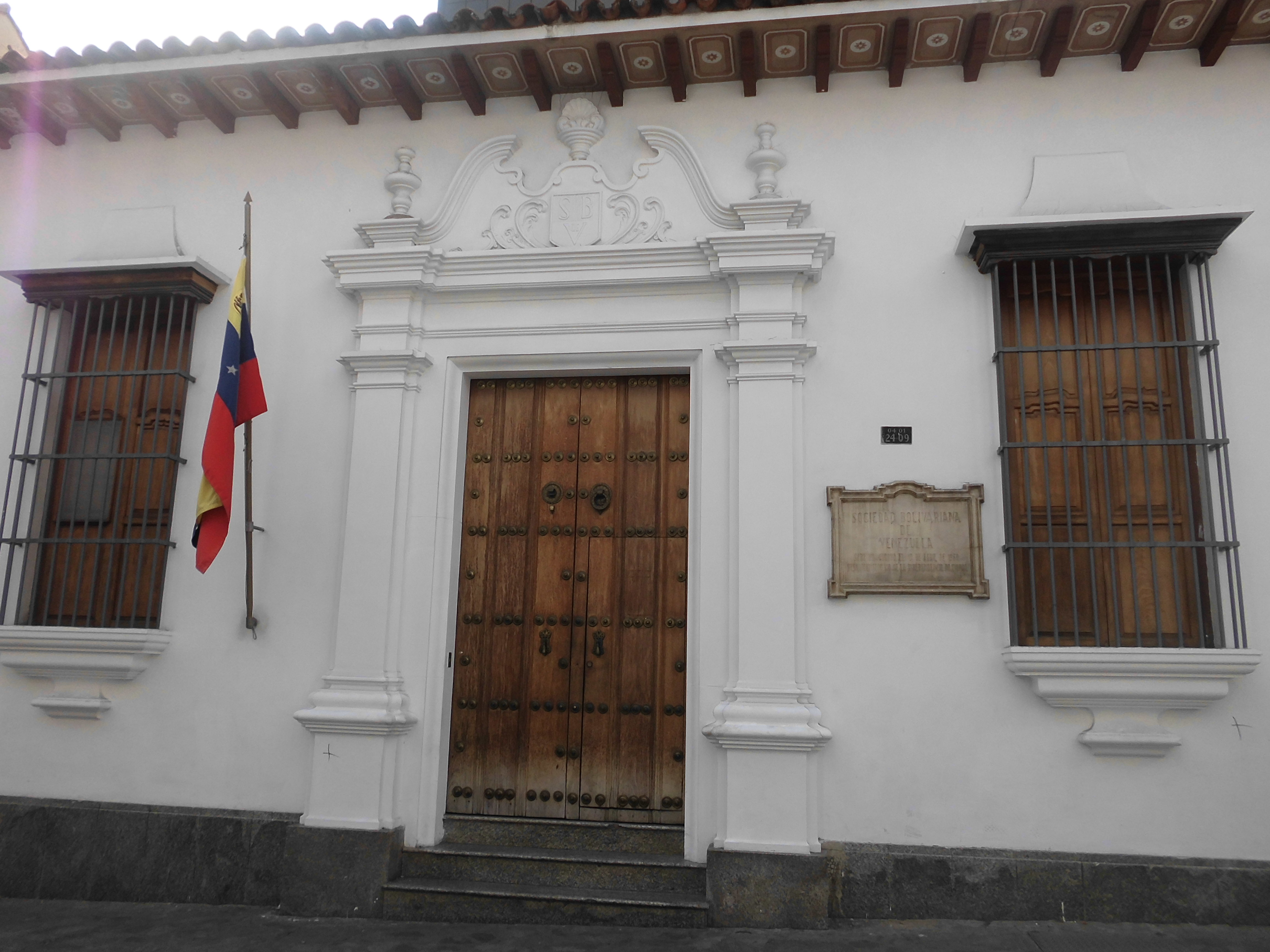 Puerta Principal de la Sociedad Bolivariana con sus dos ventanas